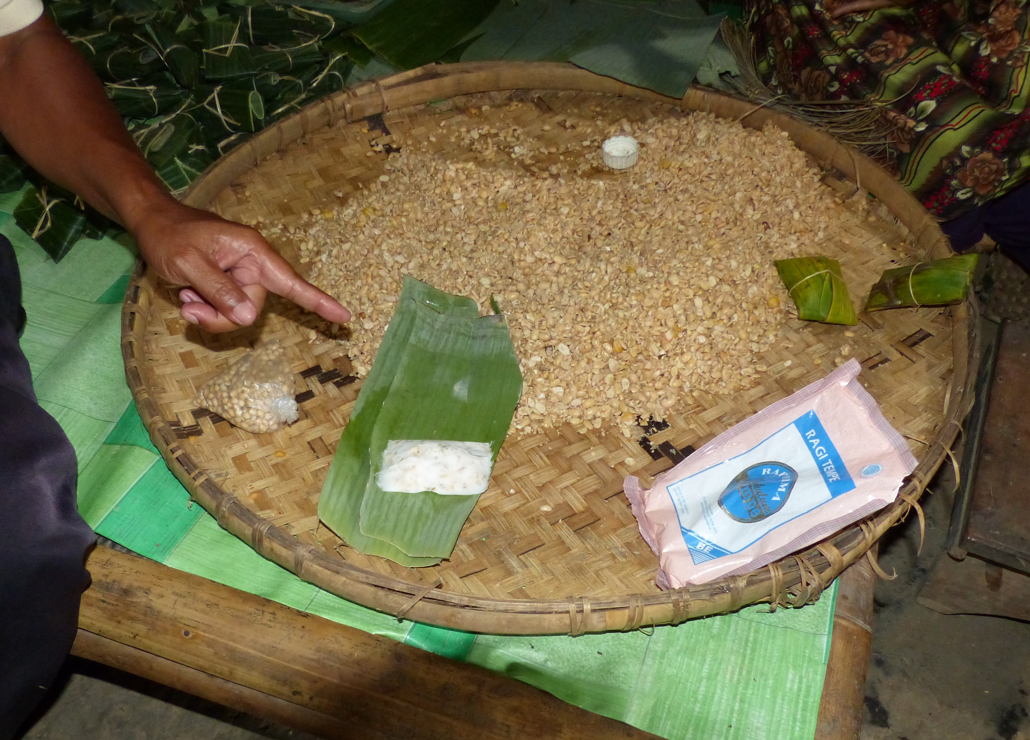 Hausindustrie: Produktion von Tempeh in einem Dorf in Mitteljava